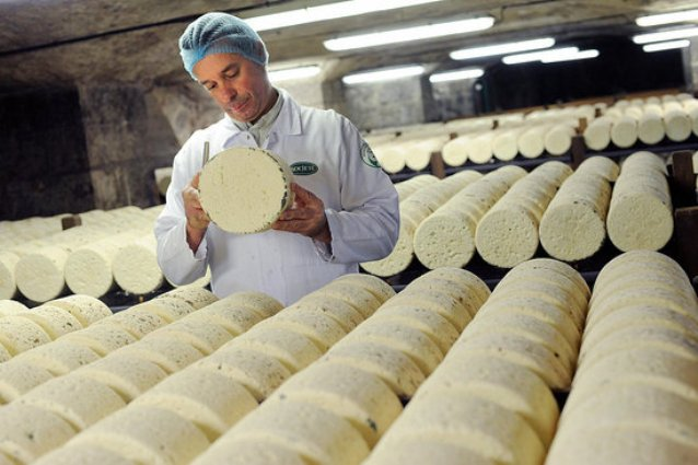 Ռոկֆոր (պանիր)